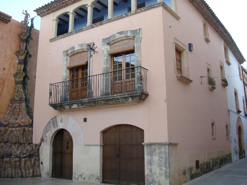 Altafulla